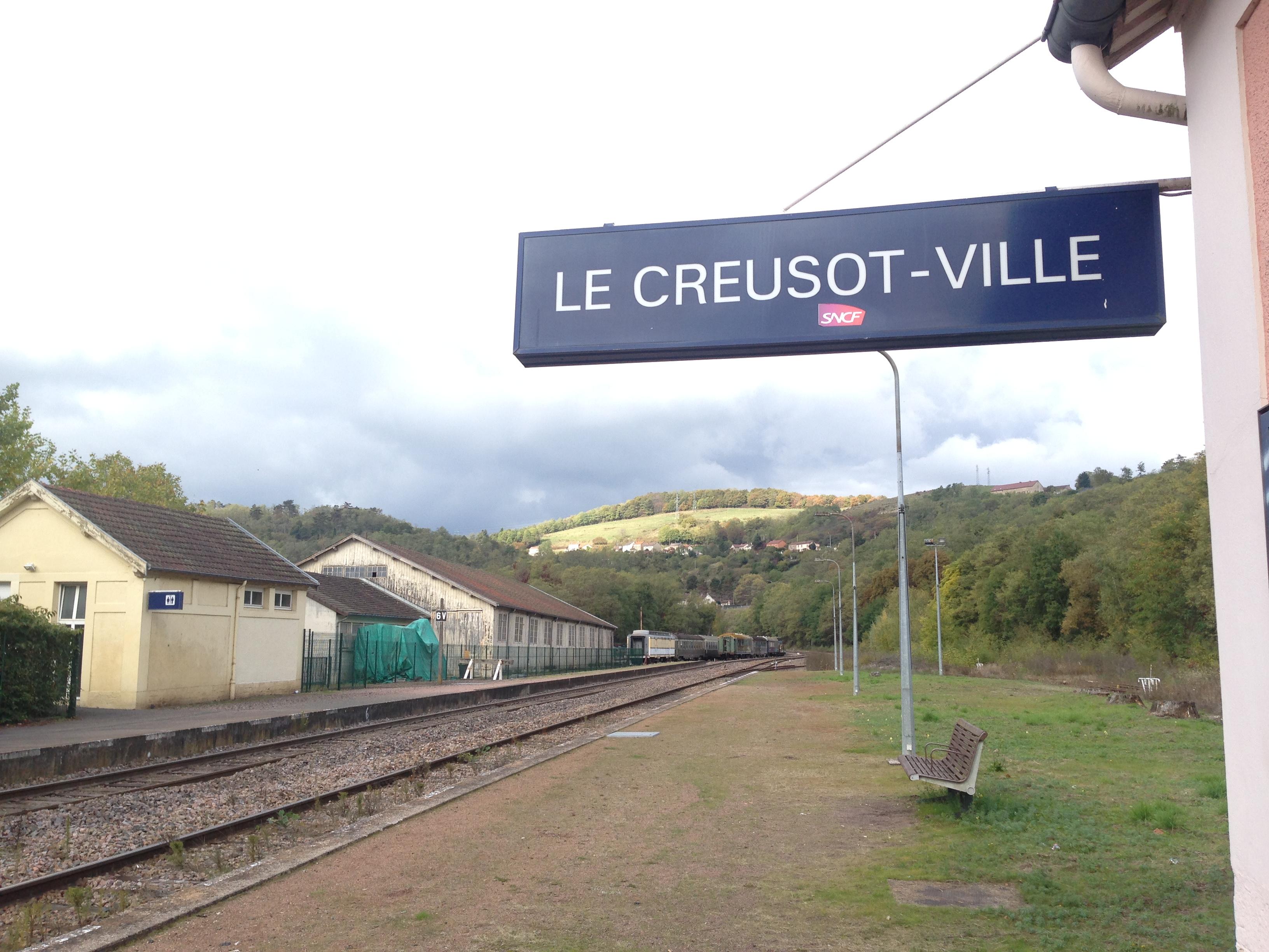 le panneau de la gare du creusot ville